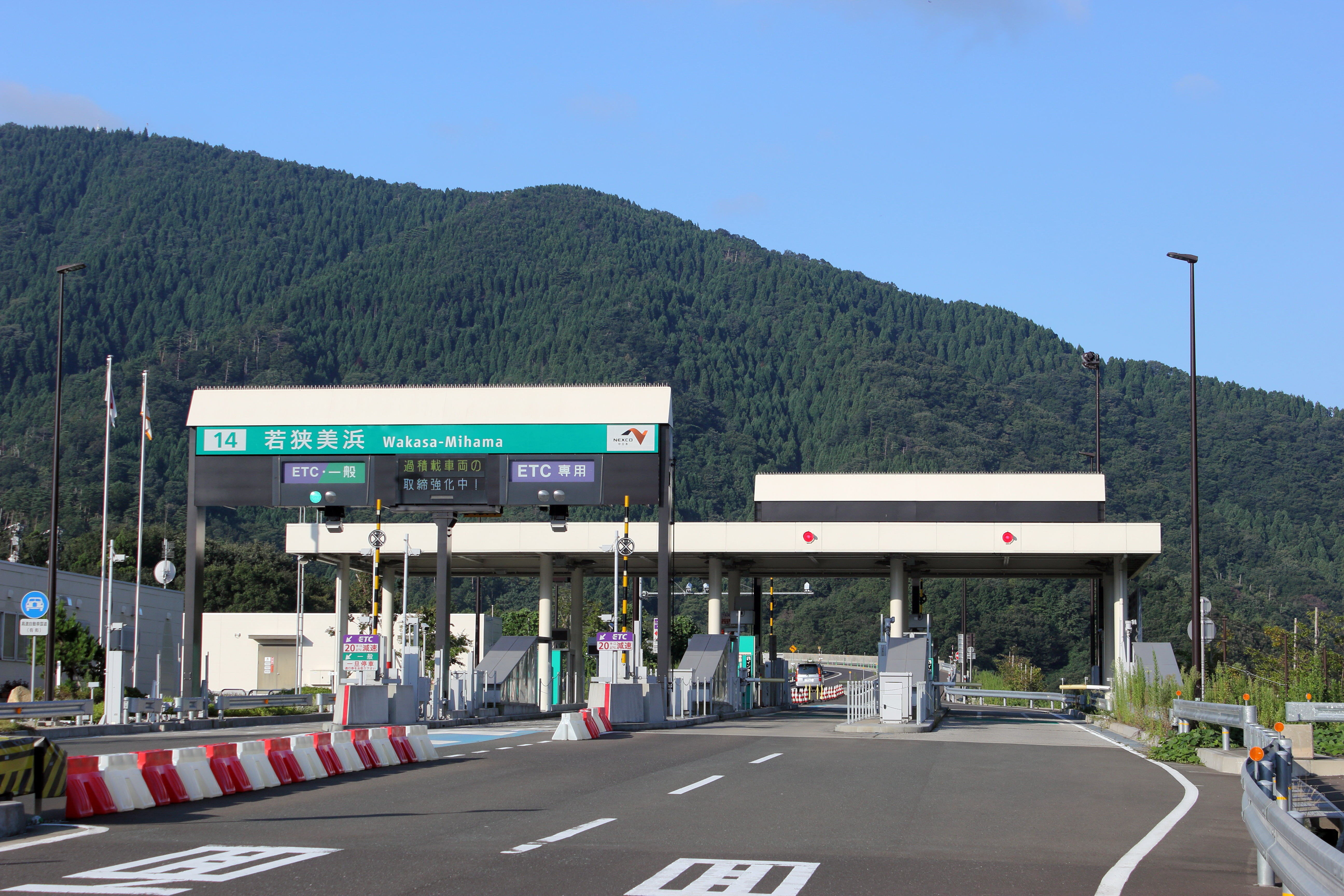 舞鶴若狭自動車道 若狭美浜インターチェンジ